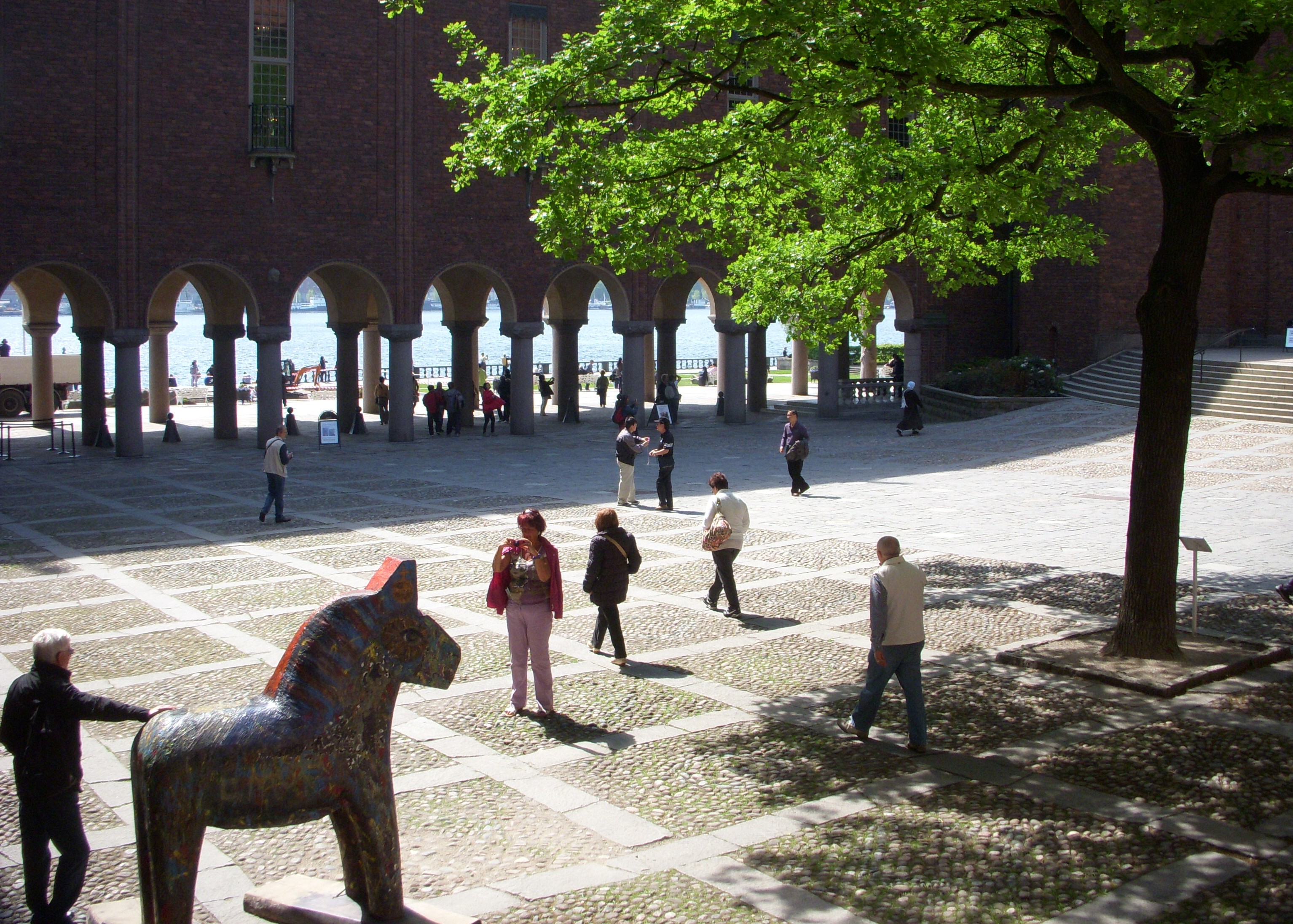 Globträdet på Stockholms stadshus' borgargården